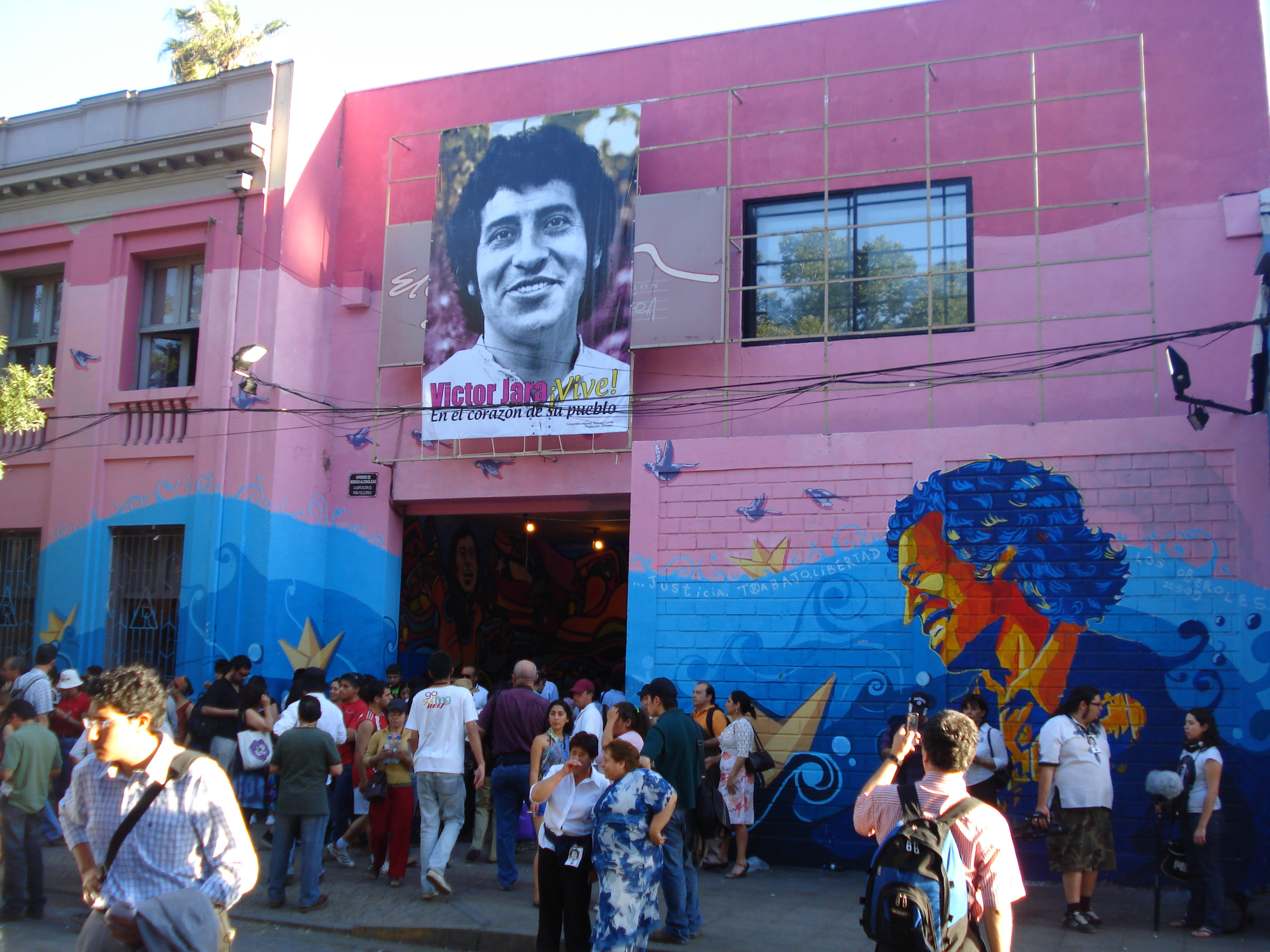 Galpón Víctor Jara (calle Huérfanos 2146, barrio Brasil) recinto dependiente de la Fundación Víctor Jara y escenario habitual de actividades culturales en la capital de Chile.